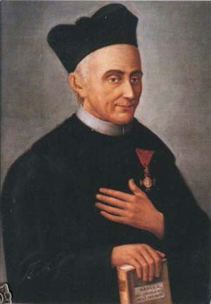 Carlo Steeb, deutscher katholischer Priester, der in Verona tätig war. Gründer der „Schwestern der Barmherzigkeit“, von der römisch-katholischen Kirche als Seliger verehrt.